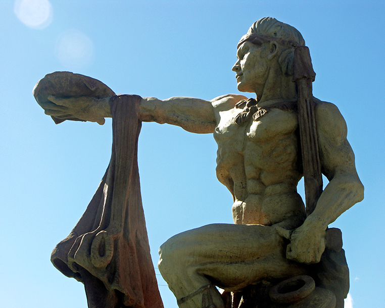 Monumento escultura al Cacique Manaure, uno de nuestros mas respetados representantes indígenas, se ubica en el Estado Falcón y la obra fue realizada por el escultor venezolano Alejandro Colina para comienzo de los años cincuenta. Cacique justo, admirado y respetado, personalmente creo que su historia poco divulgada necesita mas atención y es bueno que se honre en su memoria no solo con este monumento o un municipio con su nombre, debería existir mas lectura sobre nuestros ancestros y antepasado.